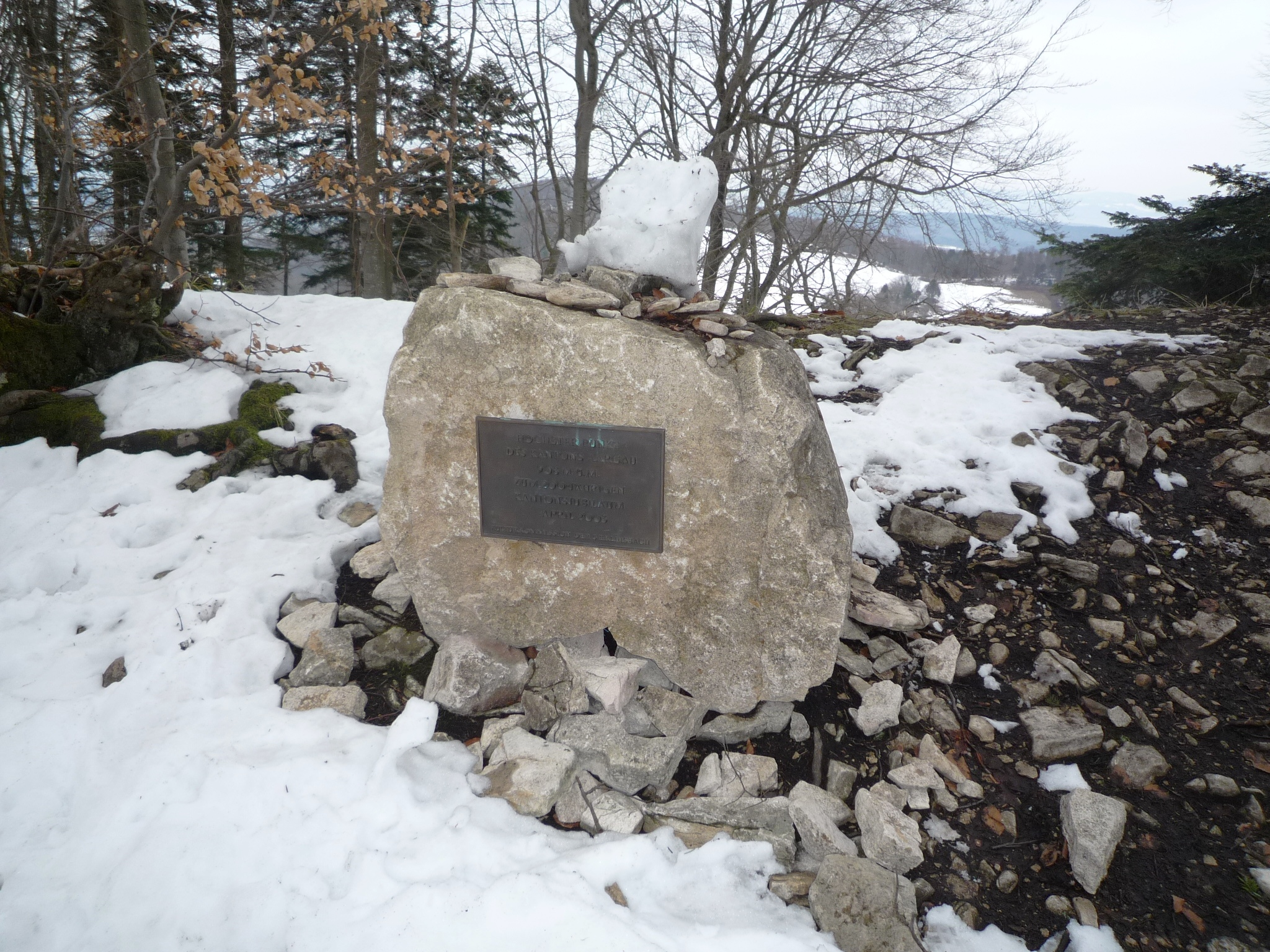 Geissfluegrat - Gipfelstein